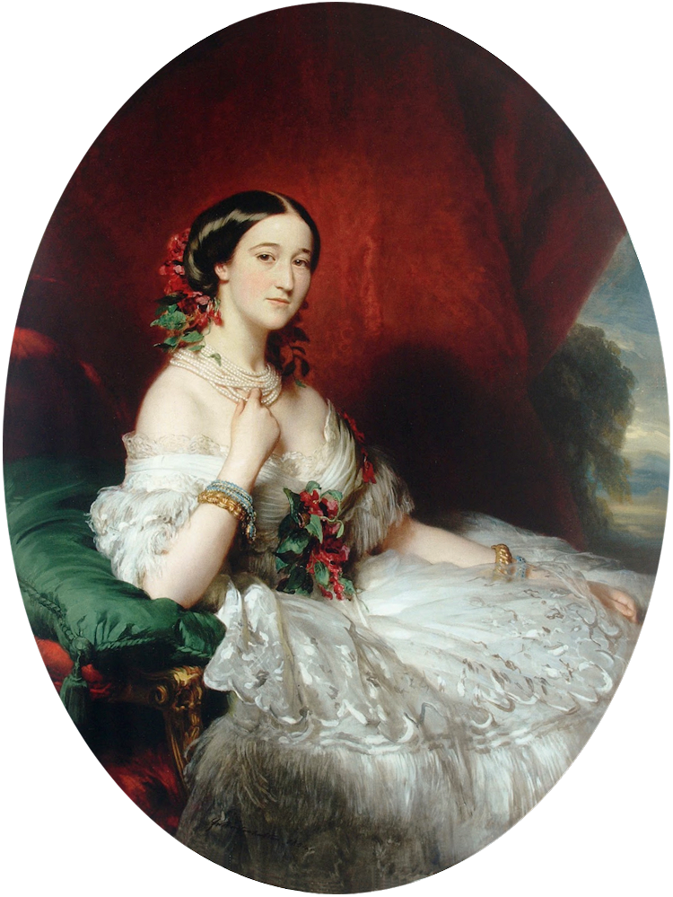 Doña María Francisca de Sales Portocarrero, XV duquesa consorte de Alba, IX condesa de Montijo.